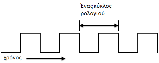 αναπαράσταση παλμού του ρολογιού συστήματος Άδεια χρήσης Το παραπάνω αρχείο διανέμεται υπό τις δύο παρακάτω άδειες χρήσης. Μπορείτε να επιλέξετε την άδεια της προτίμησής σας.